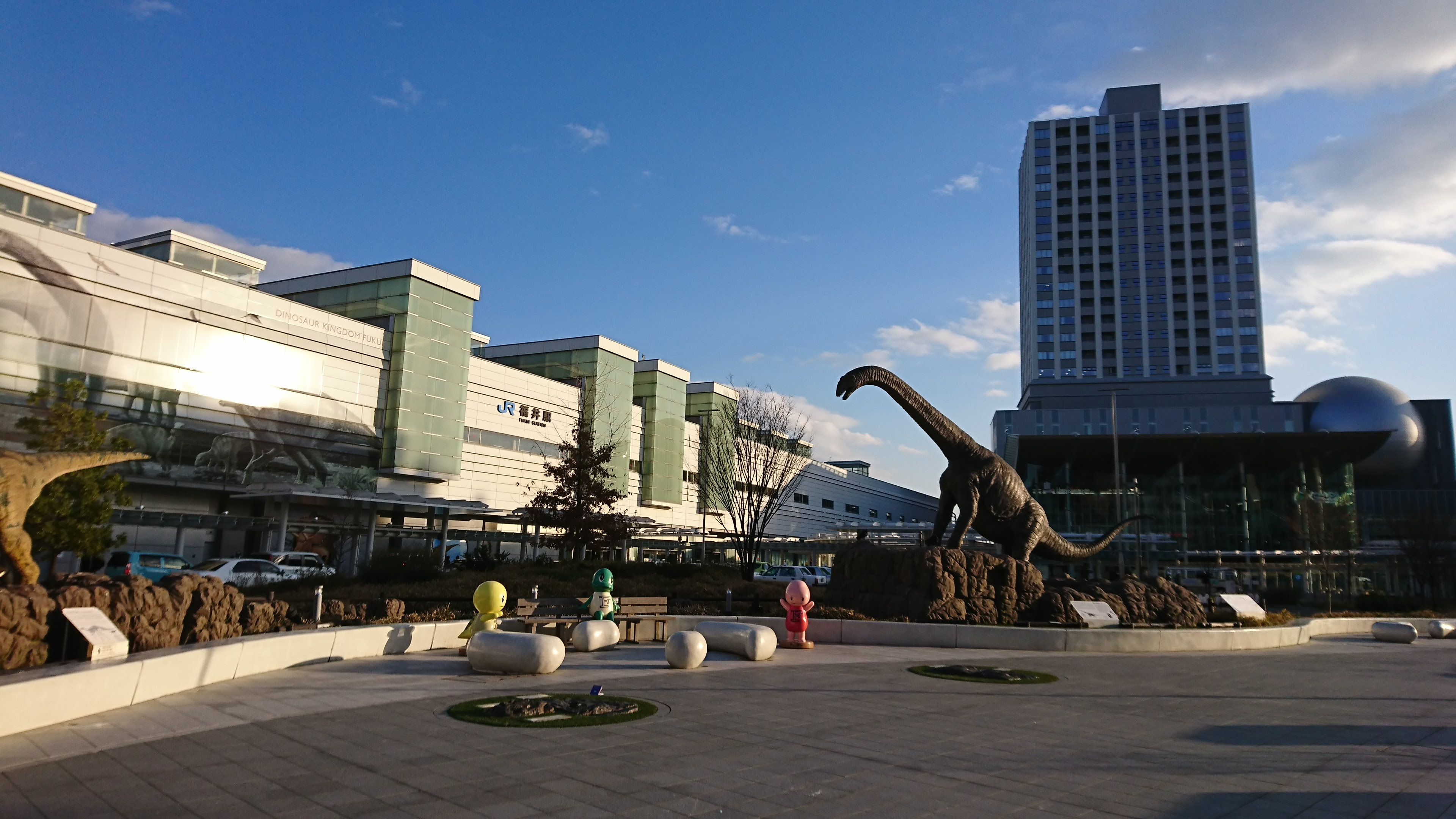 福井駅